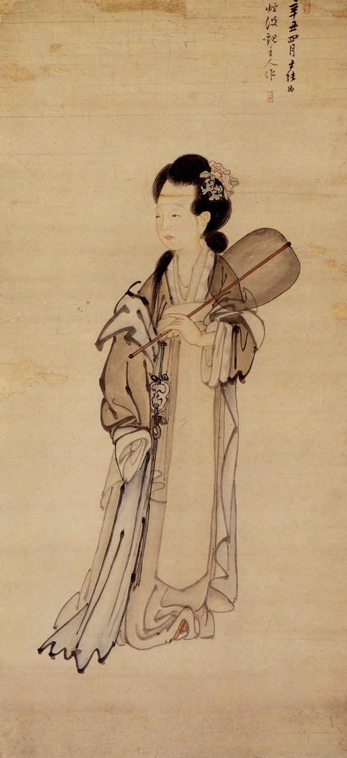 中文（香港）: 金弘道《仕女圖》